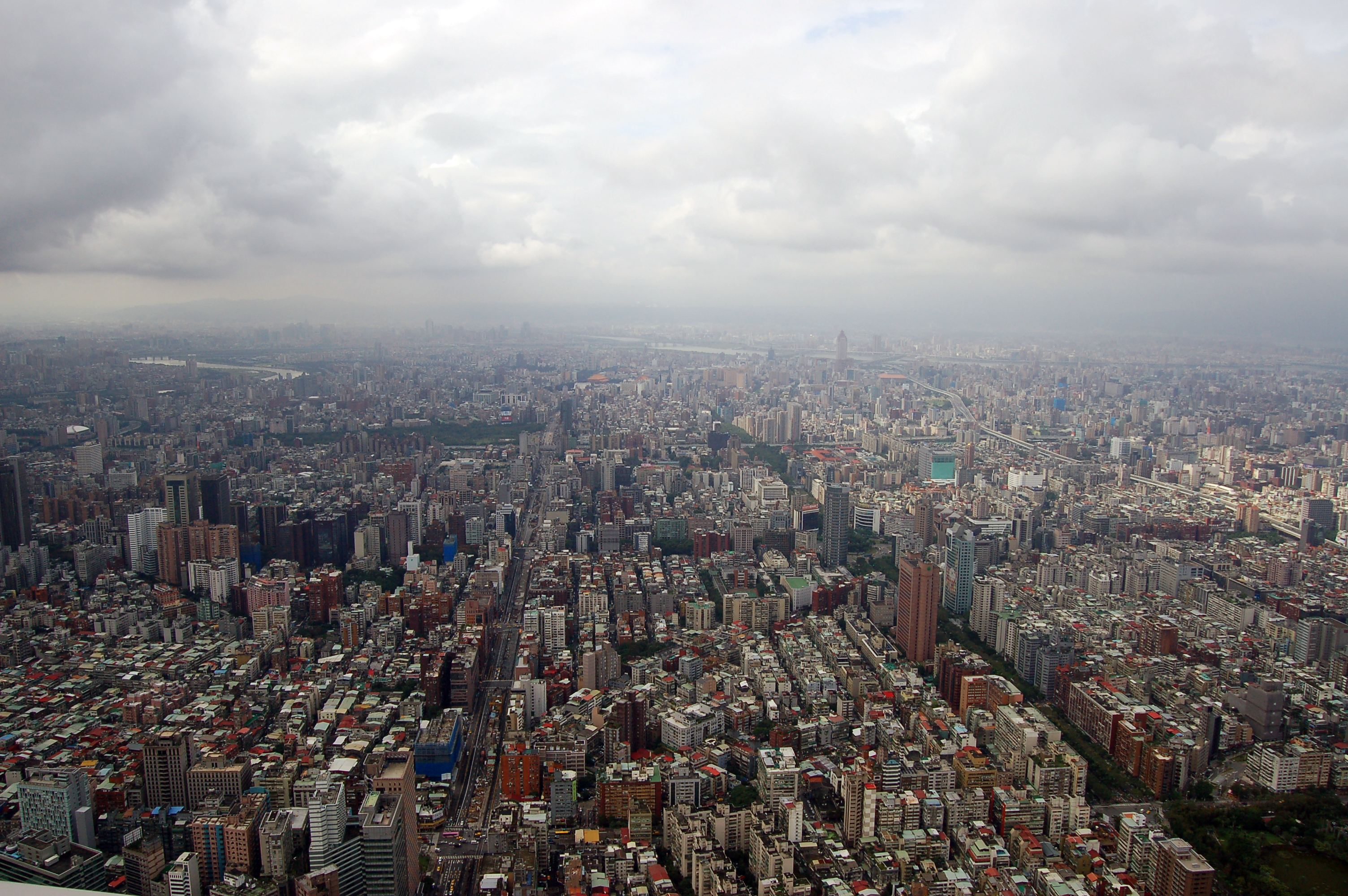 View from Taipei 101, Taiwan